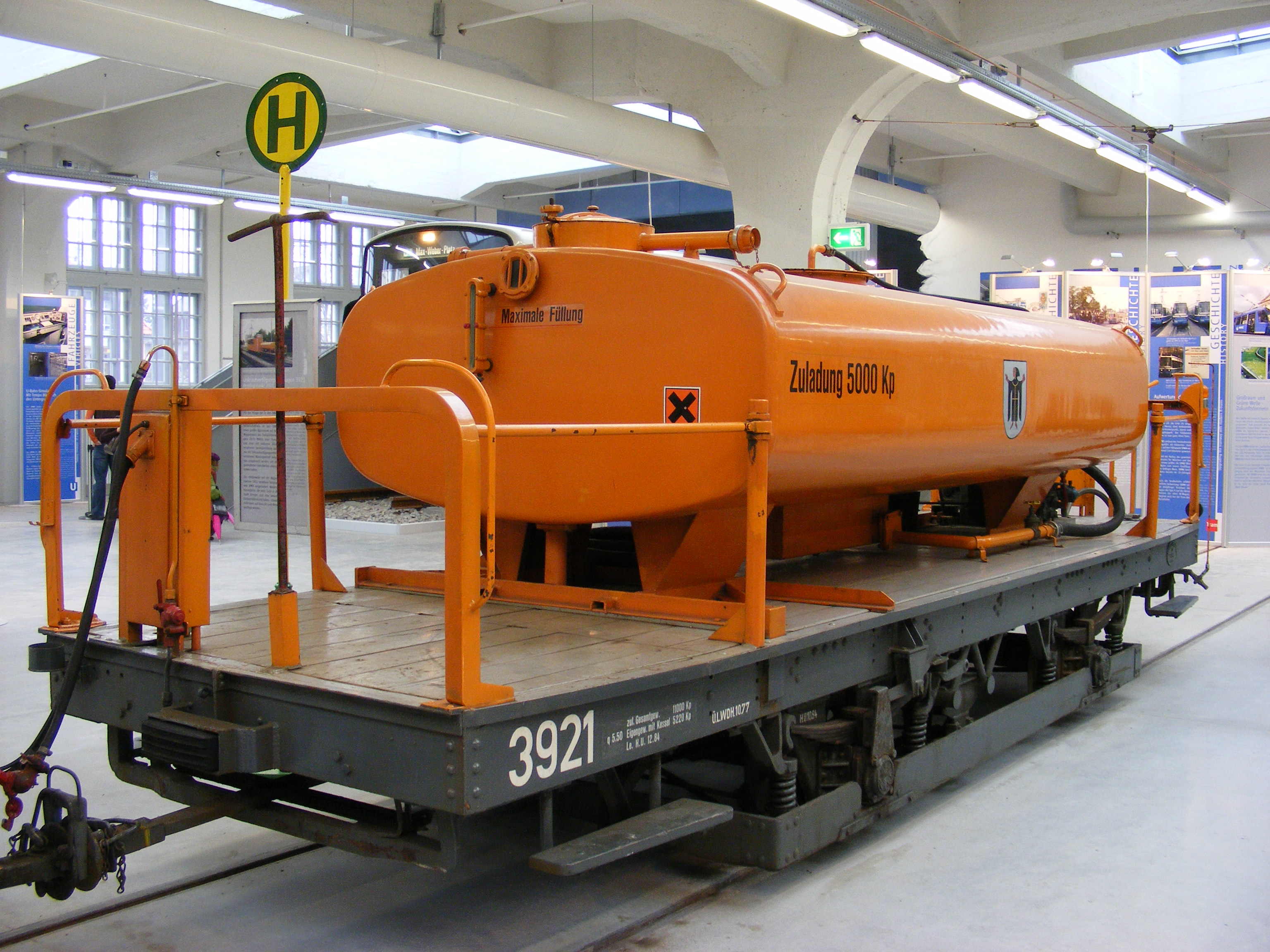 Unkrautvertilgungs-Beiwagen Nr. 3921 (ex 2871) q 5.50. Hiermit wurden Unkrautvernichtungsmittel auf das Gleisbett aufgebracht (in Gebrauch von 1960 bis 1993 für Hochgleisstrecken der Straßenbahn München)